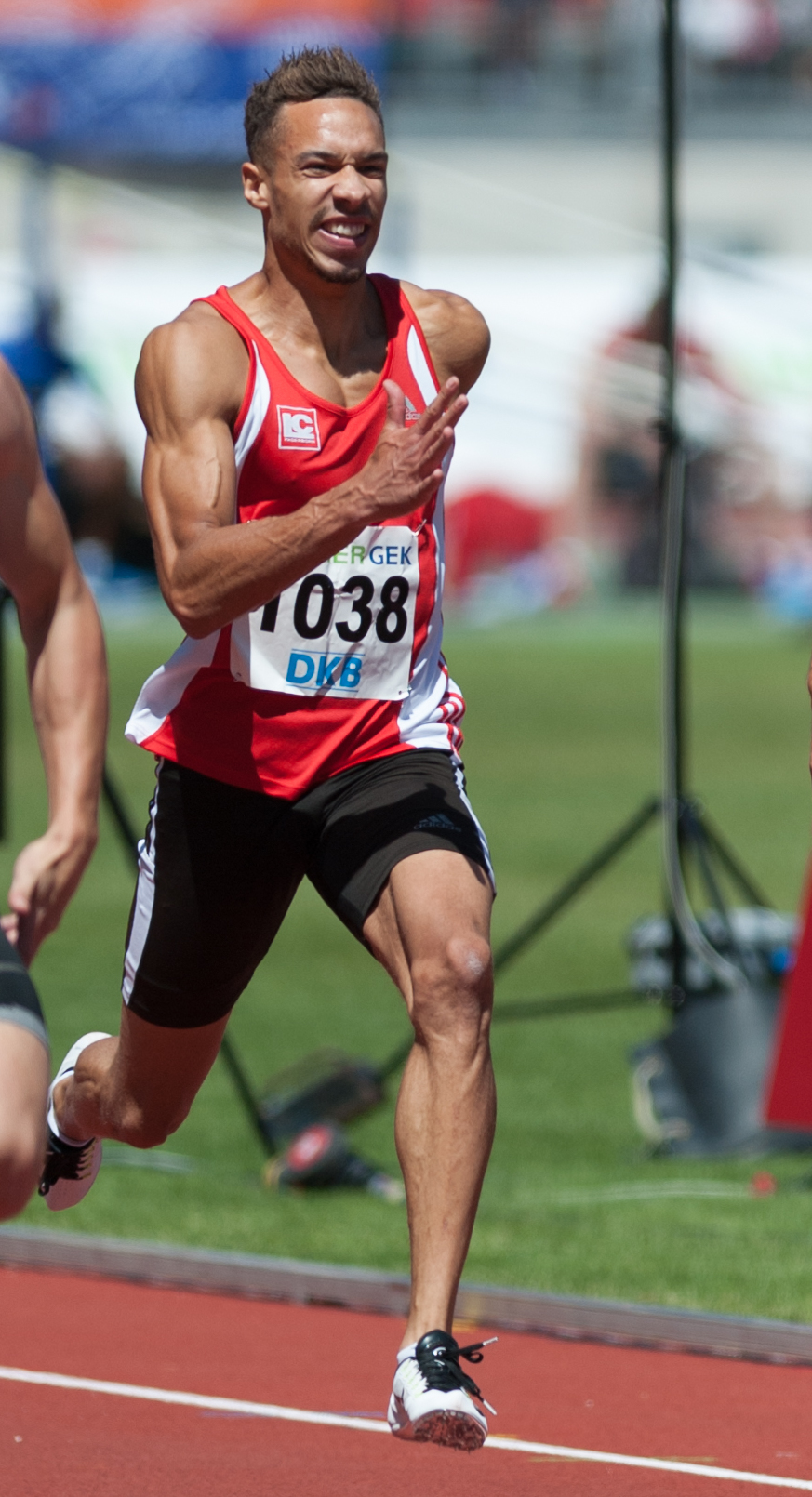 Deutsche Leichtathletik-Meisterschaften 2015: Männer 200m - Steven Müller